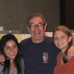 Fotografia de Harry Barkus Gray